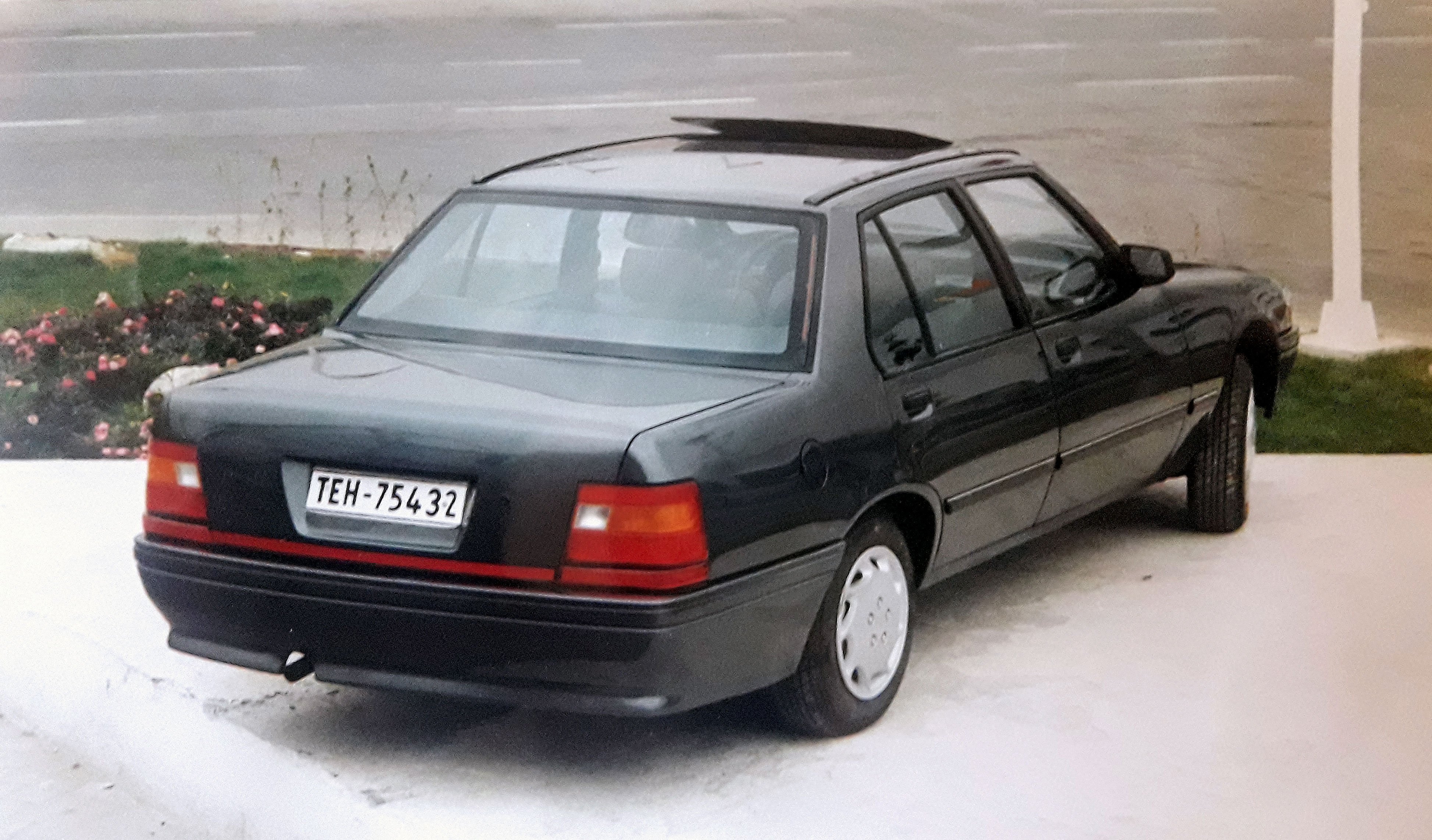 خودروی طراحی شده در مرکز تحقیقات و خدمات خودکفایی ایران در سال 73، محل دائمی نمایشگاه های بین المللی تهران